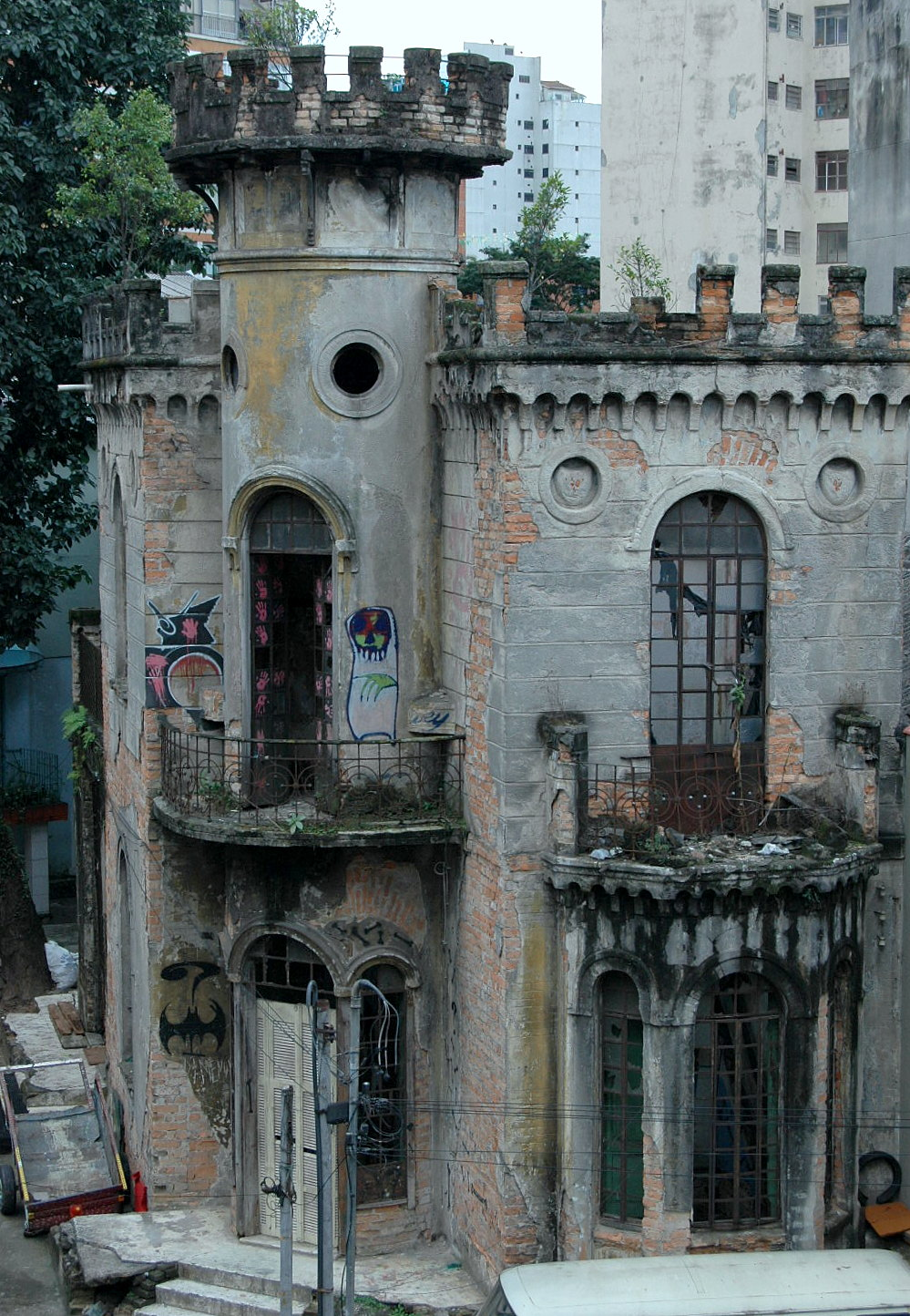 Castelinho da Rua Apa